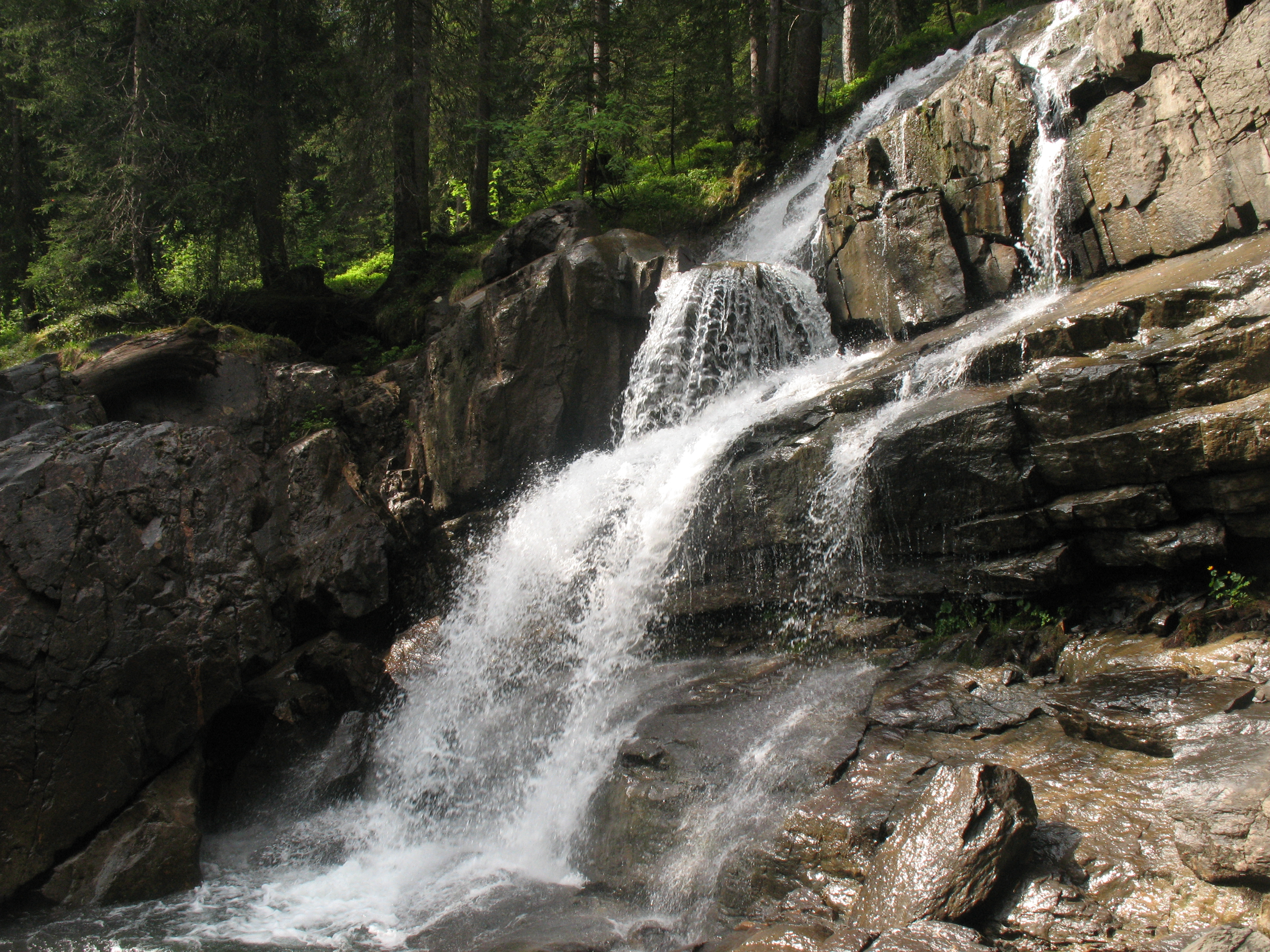 Wasserfall des Schwarzwasserbaches im Allgäuer Schwarzwassertal, oberhalb der Melköde.